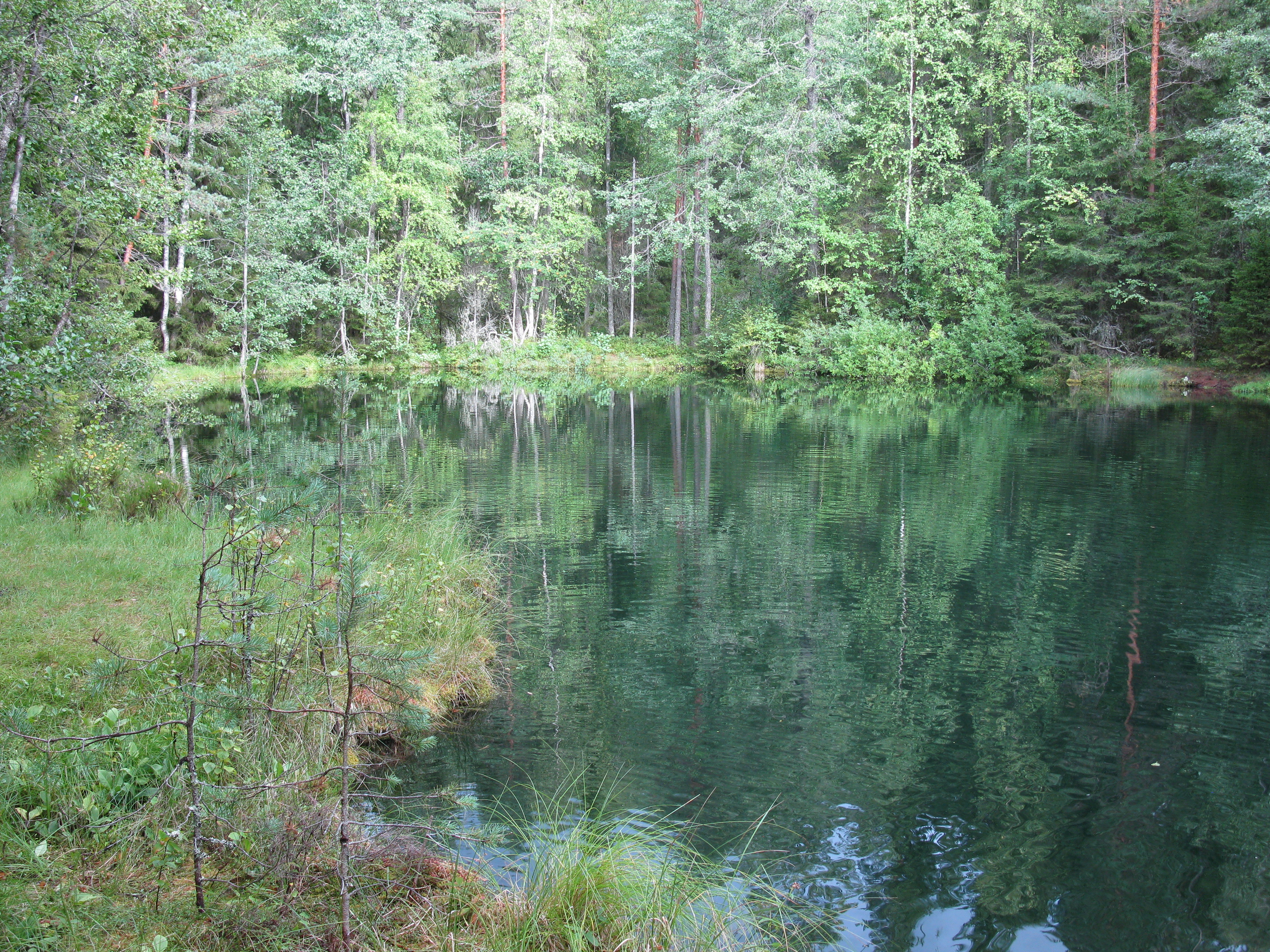 Kultalähde Kiikalassa Salossa Varsinais-Suomessa. Kiikalan seurakunta rauhoitti lähteen ympäristöineen vuonna 1959.